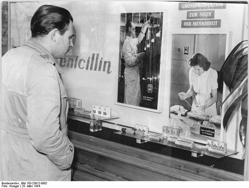 Königs Wusterhausen, "Märkische Apotheke", Schaufenster Zentralbild Krueger Wjt-Sta.-Ho. 23 Mot. 25.3.1954 "Märkische Apotheke" Königs Wusterhausen sichert die Versorgung der Landbevölkerung mit Medikamenten und Arzneien Die "Märkische Apotheke" in Königs Wusterhausen ist zu einem wichtigen Bindeglied zwischen Arzt und Patienten geworden. Diese staatlich verwaltete Apotheke gibt durch ihre vorbildlichen Einrichtungen, dem qualifizierten Fachpersonal und der darüber hinaus in den Laboratorien geleisteten wissenschaftlichen Arbeit, dem Arzneimittelempfänger die Gewähr für die Abgabe richtig dosierter Medikamente hochwertiger Qualität. Als Ausbildungsstätte für den Nachwuchs auf dem Gebiet des Apothekenwesens und der Pharmazie ist die "Märkische Apotheke" Königs Wusterhausen, die 1953 ihren Neubau in der Nähe des Bahnknotenpunktes Königs Wusterhausen beziehen konnte, in den Mittelpunkt des Interesses auf dem Gebiete des Gesundheitswesens gerückt. UBz: Das Schaufenster der staatlich verwalteten "Märkischen Apotheke" steht im Dienst der Aufklärung der Bevölkerung über die Leistungsfähigkeit der volkseigenen Pharmazie-Betriebe. Hier sind Schautafeln der Erfindung und der Grossproduktion des Penicillin gewidmet. Die volkseigene Produktion zeigt die Vielzahl der Spezialpräparate, welche den Krankenhäusern, Polikliniken und frei praktizierenden Ärzten für die Behandlung zur Verfügung stehen.